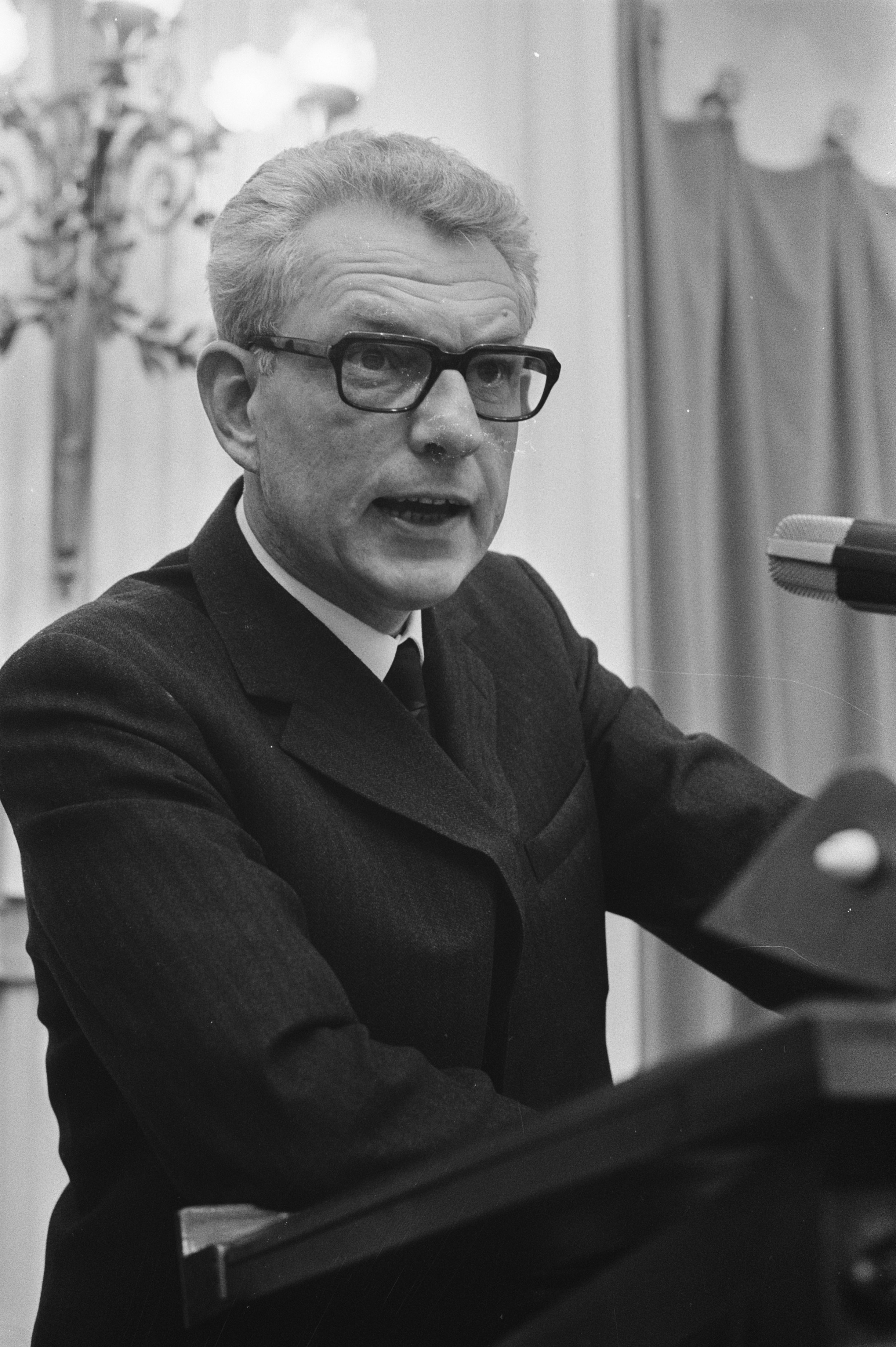 Collectie / Archief : Fotocollectie Anefo Reportage / Serie : [ onbekend ] Beschrijving : CPN-fractievoorzitter Bakker bij een interpellatie in het Tweede Kamerdebat over de uitspraak van rechter Stheeman over een stakingsverbod voor de metaalsector Datum : 16 februari 1972 Locatie : Den Haag, Zuid-Holland Trefwoorden : parlementaire debatten, parlementariërs, politiek, portretten, stakingen Persoonsnaam : Bakker, Marcus Instellingsnaam : CPN, Tweede Kamer Fotograaf : Verhoeff, Bert / Anefo Auteursrechthebbende : Nationaal Archief Materiaalsoort : Negatief (zwart/wit) Nummer archiefinventaris : bekijk toegang 2.24.01.05 Bestanddeelnummer : 925-3894